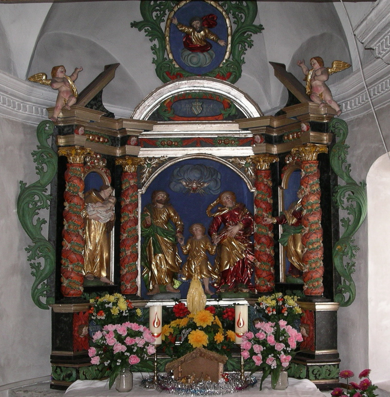 Altar (1729) der Kapelle in Steinhaus, Motiv: Heilige Familie („Heiliger Wandel“)